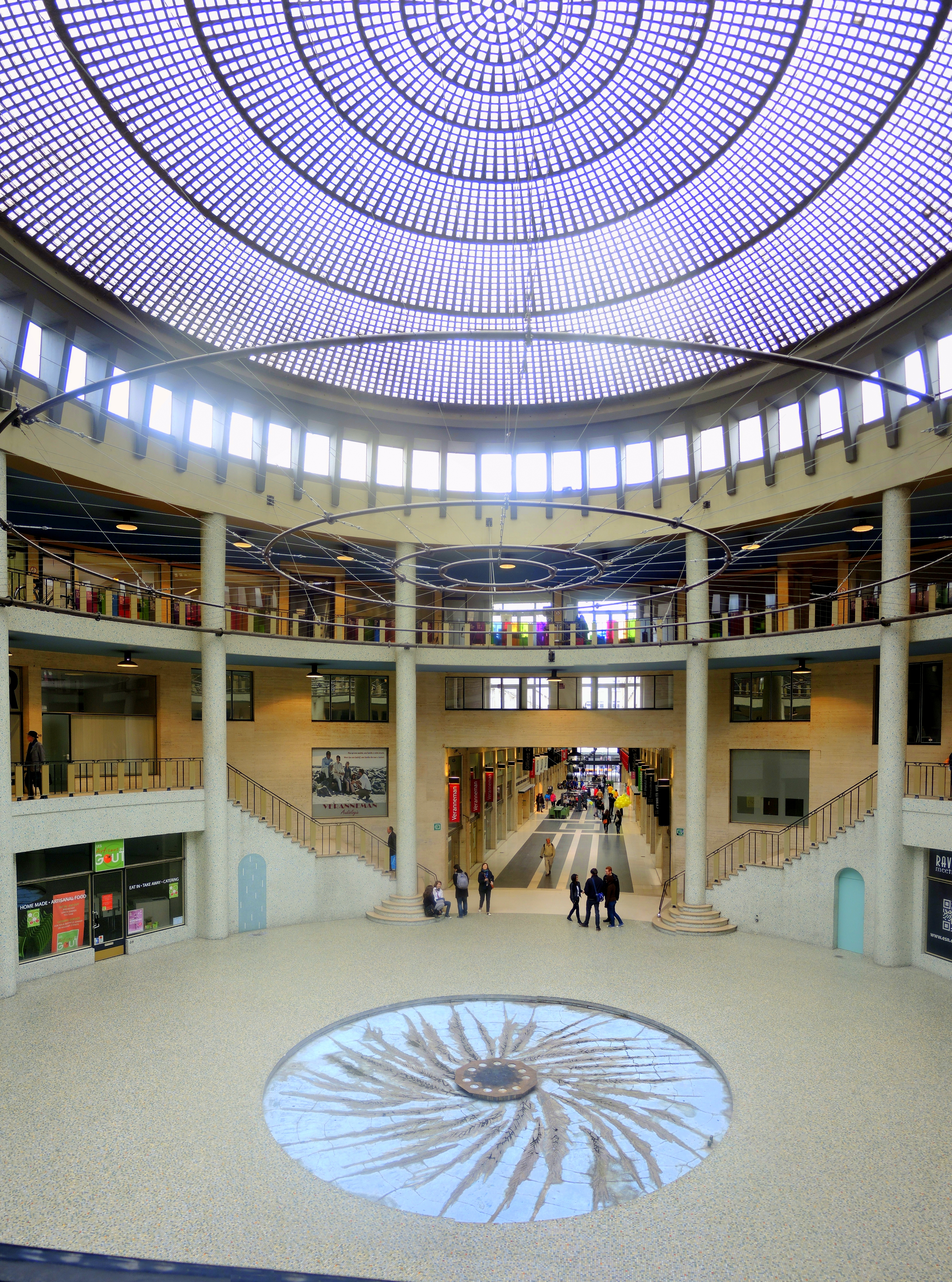 Ravensteinpassage rund